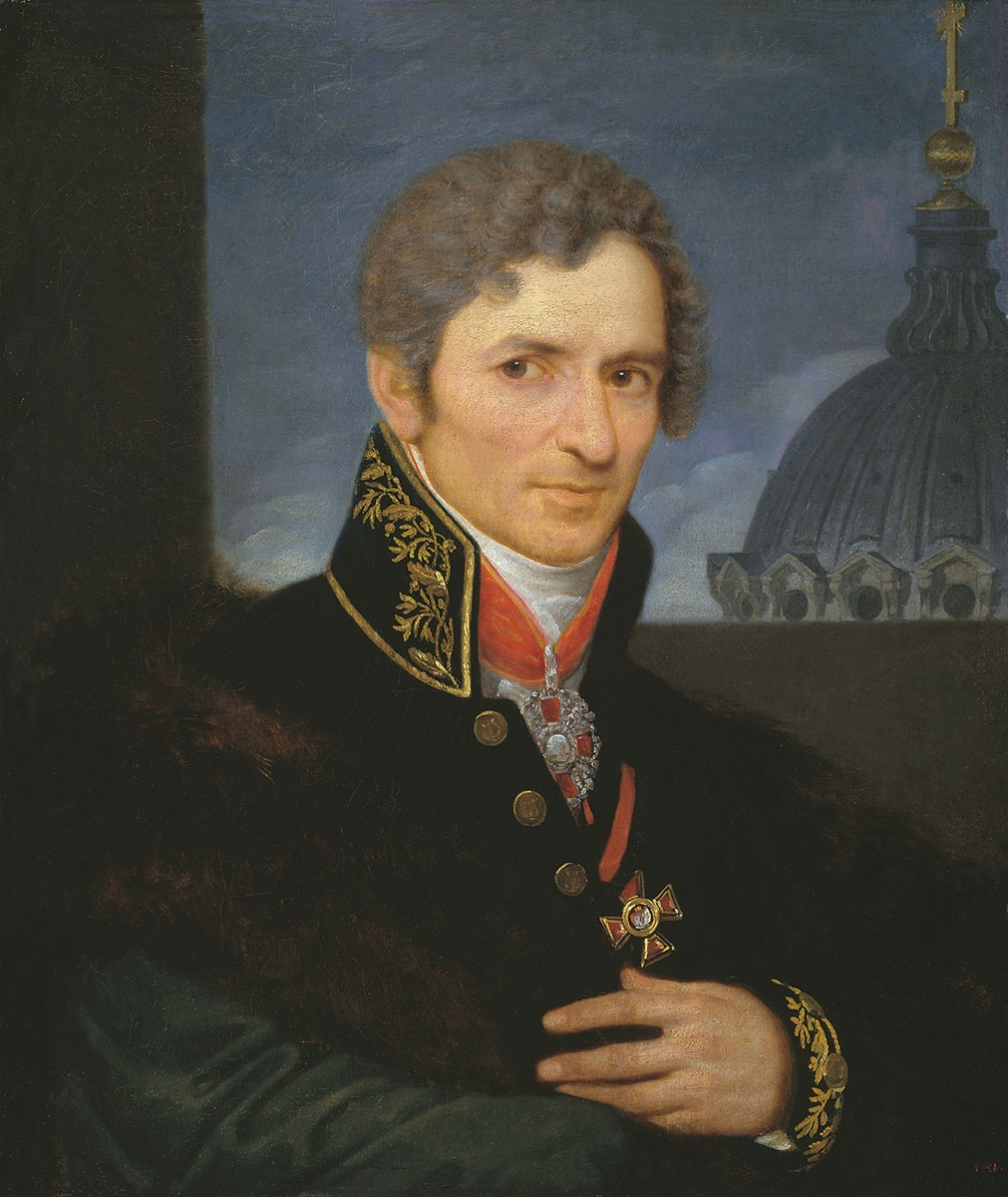 Неизвестный художник. Портрет А. Воронихина. До 1811. ГРМ